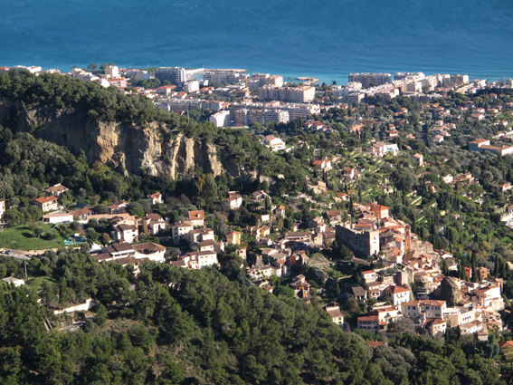 Roquebrune-Cap-Martin vu du mont Gros, PACA, France